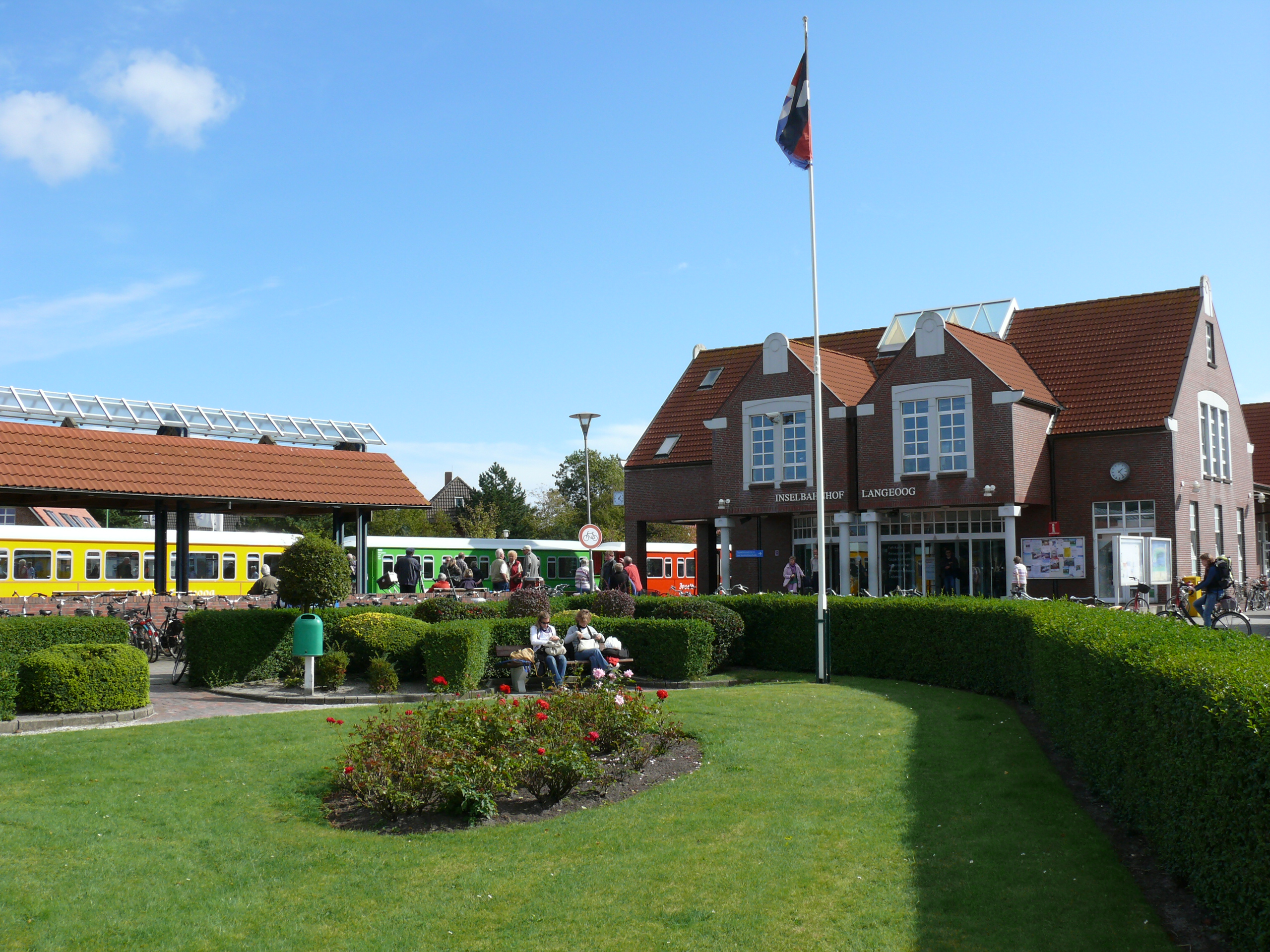 Inselbahnhof Langeoog